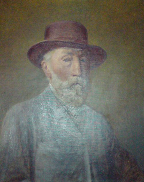 Selbstportrait von JG Steffan